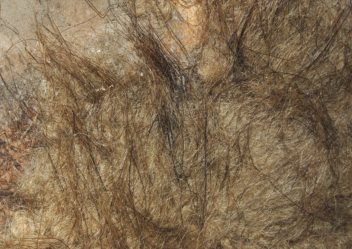 Naturhistorisches Museum Wien